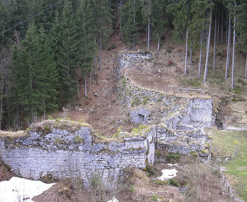 Burg Ehrenberg bei Reutte (Tirol). Das barocke Hornwerk am Schlossanger.